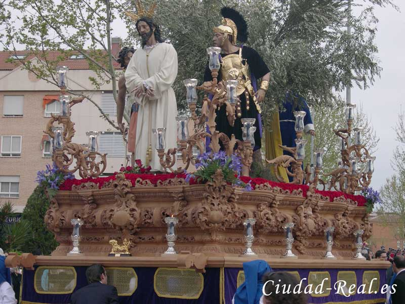 Foto que cedí a la pag, de CR, cedo derechos!